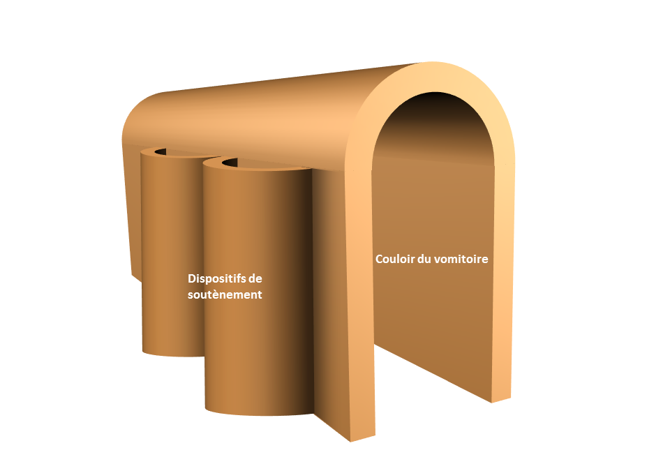 dispositif de soutènement destiné à maintenir le remblai de l'amphithéâtre